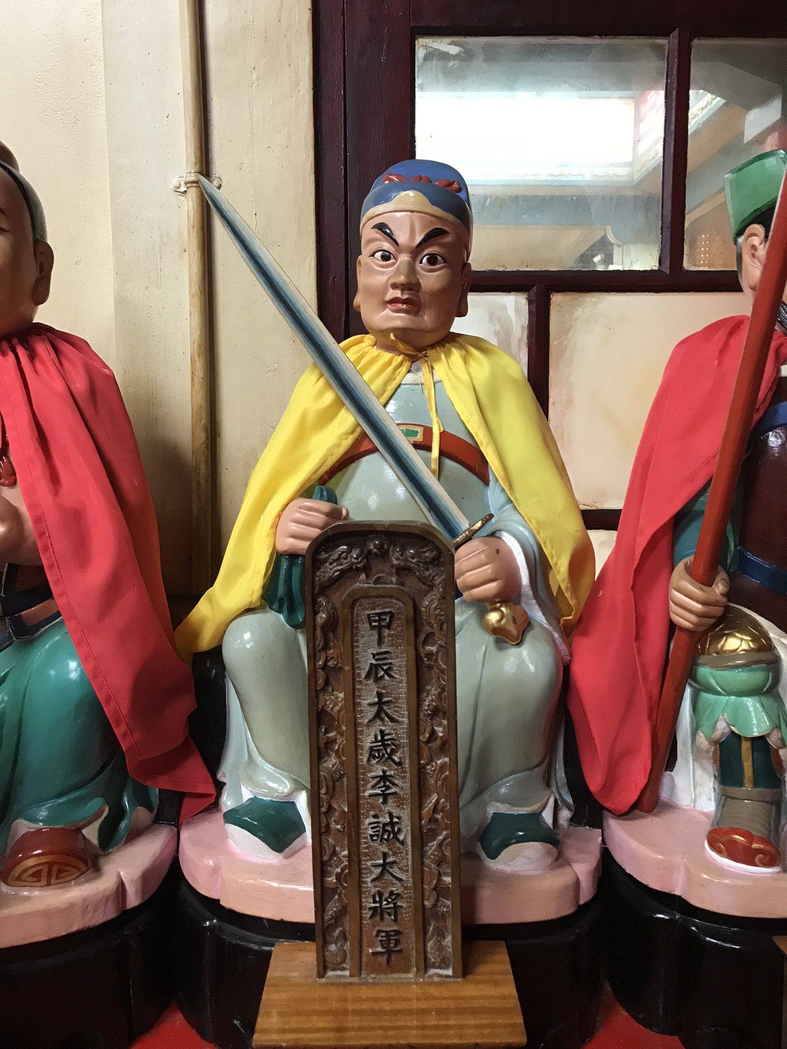 甲辰太歲李誠大將軍神像